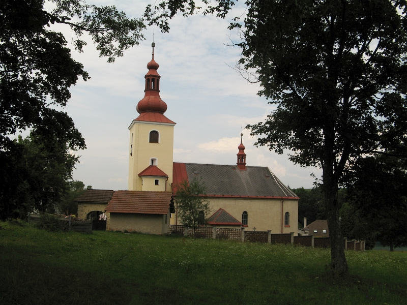 Kostel svatých Petra a Pavla, Dětřichov (okres Svitavy).